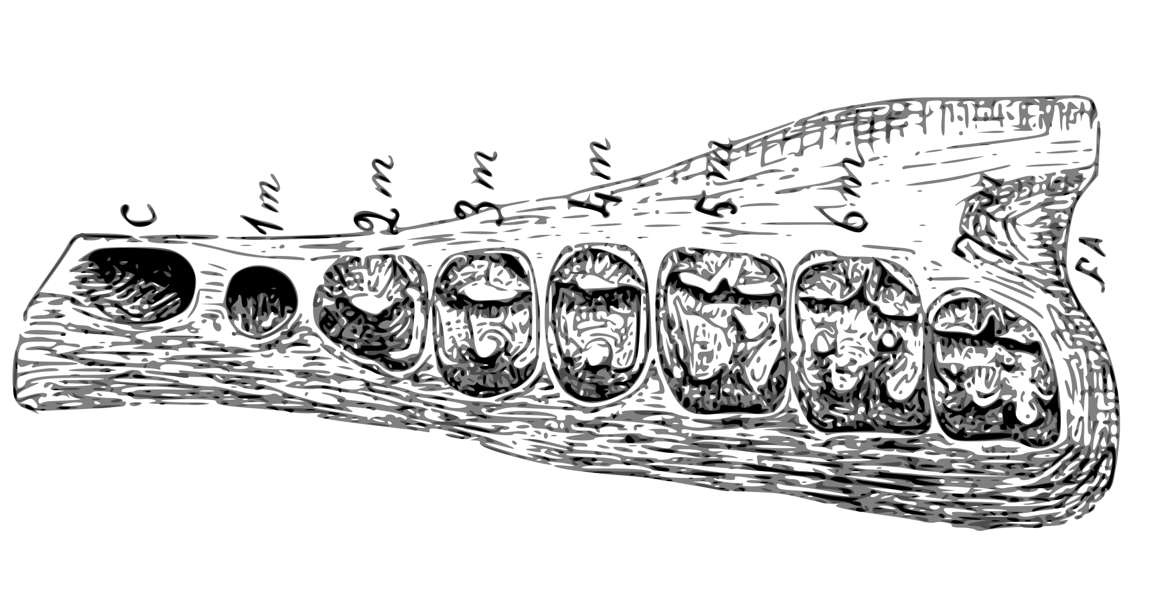 Didolodus multicuspis, material tipo. Modificado de Ameghino, F. (1897). Mammifères crétacés de l'Argentine: deuxième contribution à la connaisance de la faune mammalogique des couches à pyrotherium. Imprenta y papeleria" La Buenos Aires" Morena Esquina Peru.